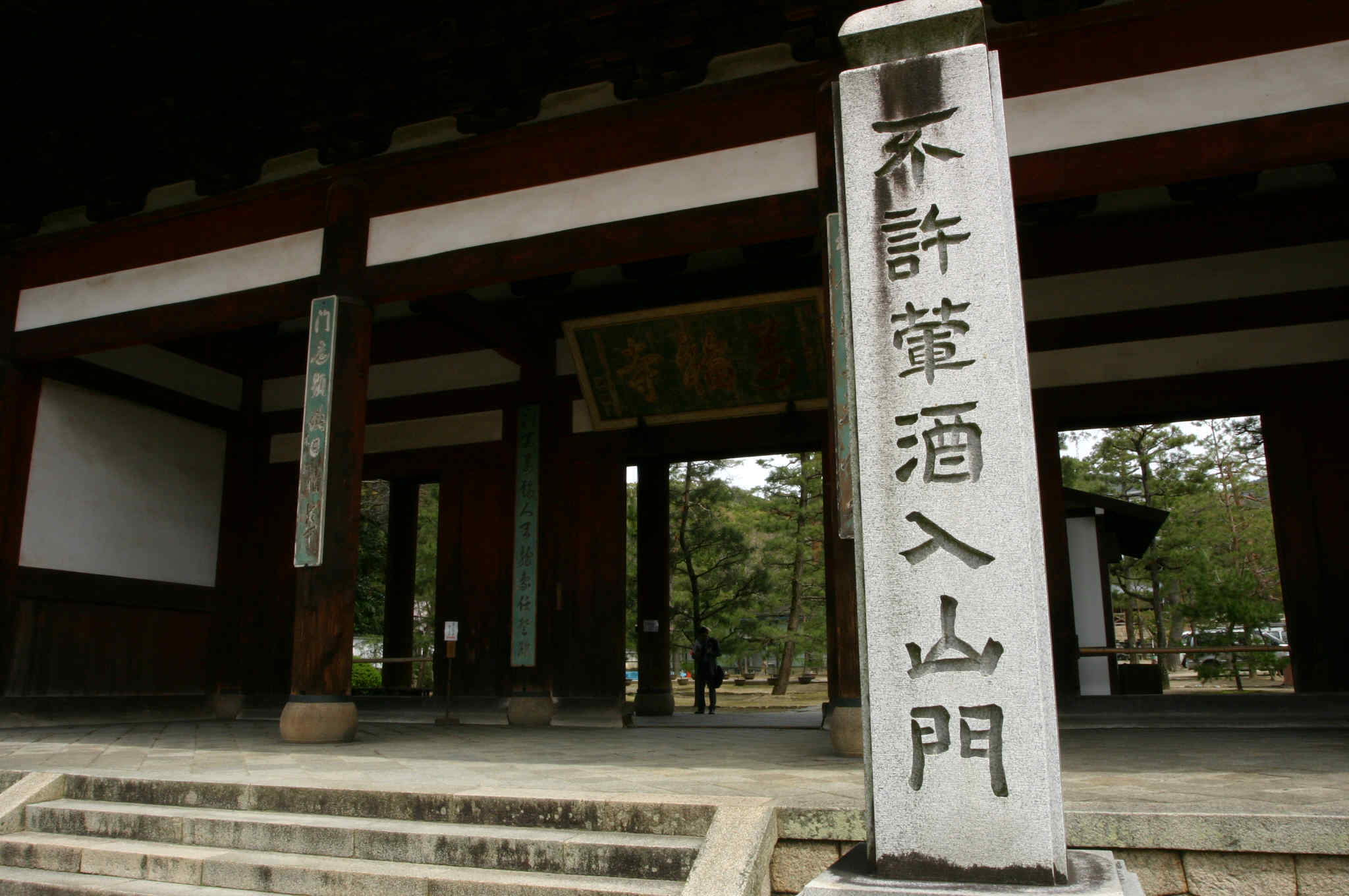 Manpuku temple gate